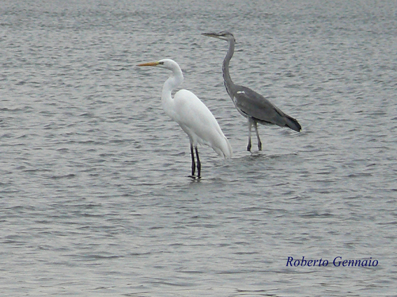 coppia di aironi